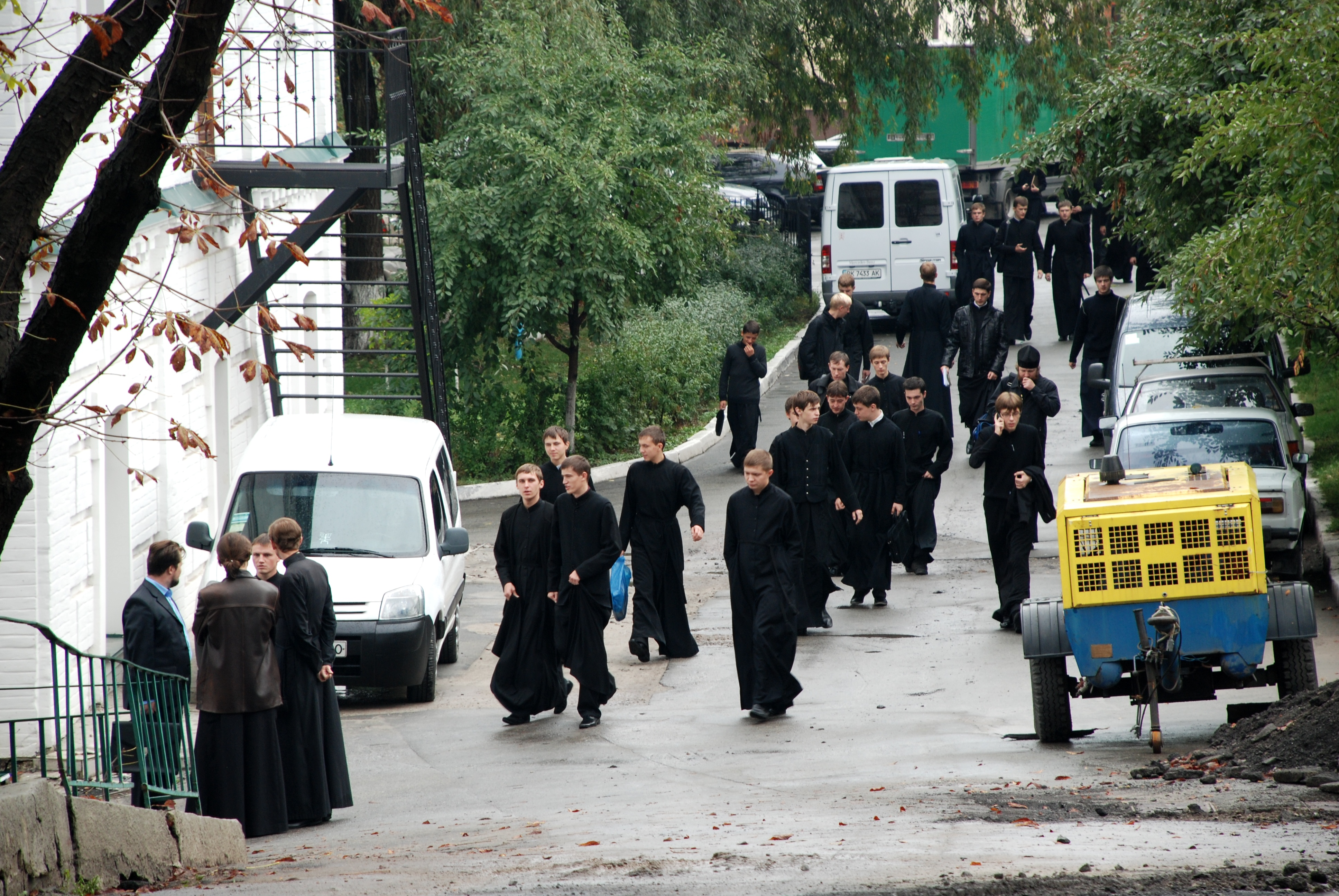 Комплекс Києво-Печерської лаври (Національний заповідник Києво-Печерська Лавра), Київ, Лаврська вул., 9, 15